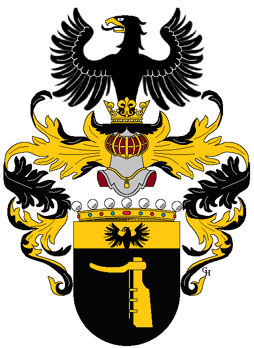 Wappen des Politikers Anton Banhans (1825–1902), verliehen anlässlich seiner Erhebung in den österreichischen Freiherrenstand 1886. Zeichnung von Gerd Hruška ( Für weitere Informationen zu dieser Standeserhebung siehe (